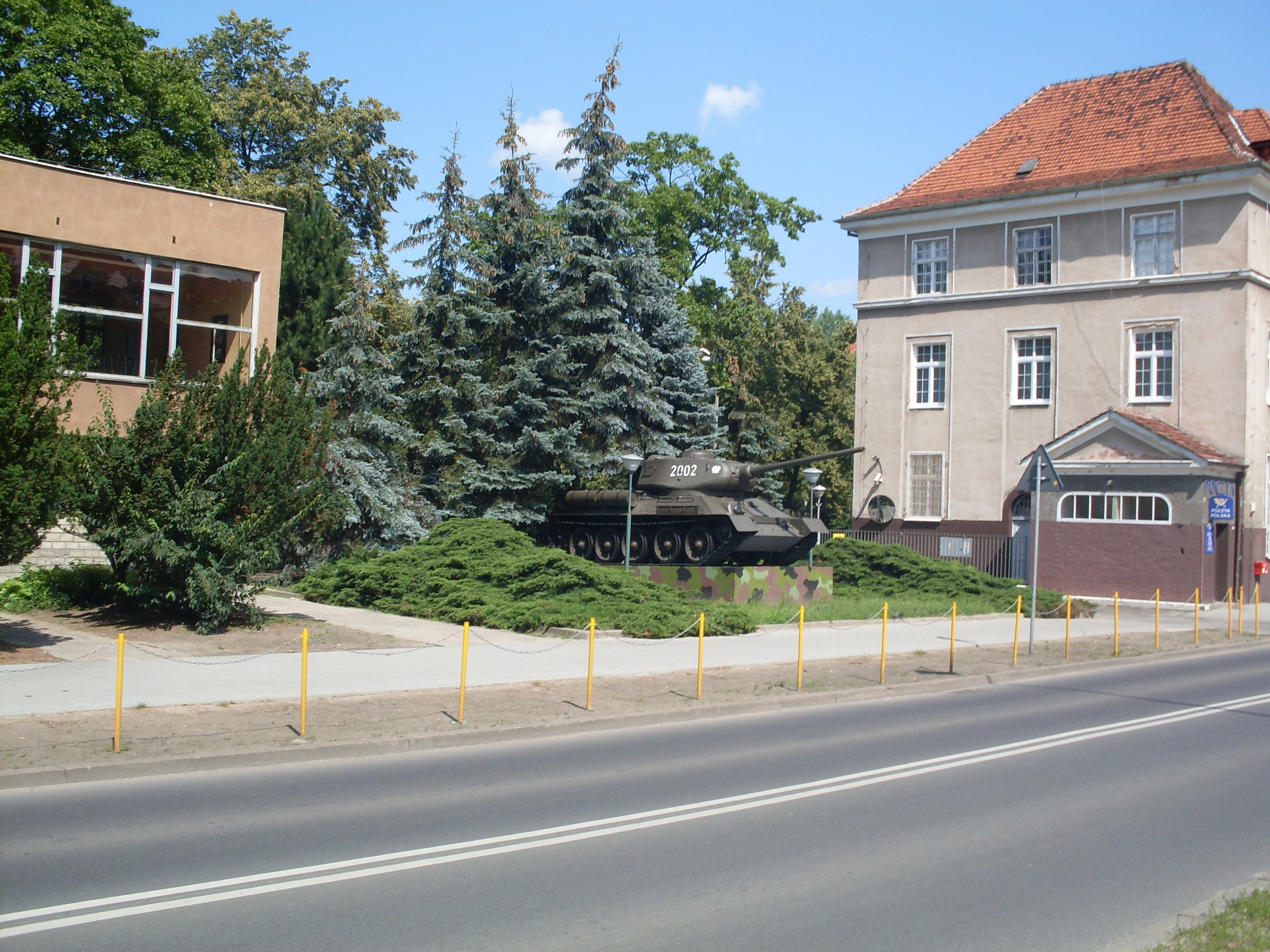 CSWLąd im. Czarnieckiego Wejscie główne